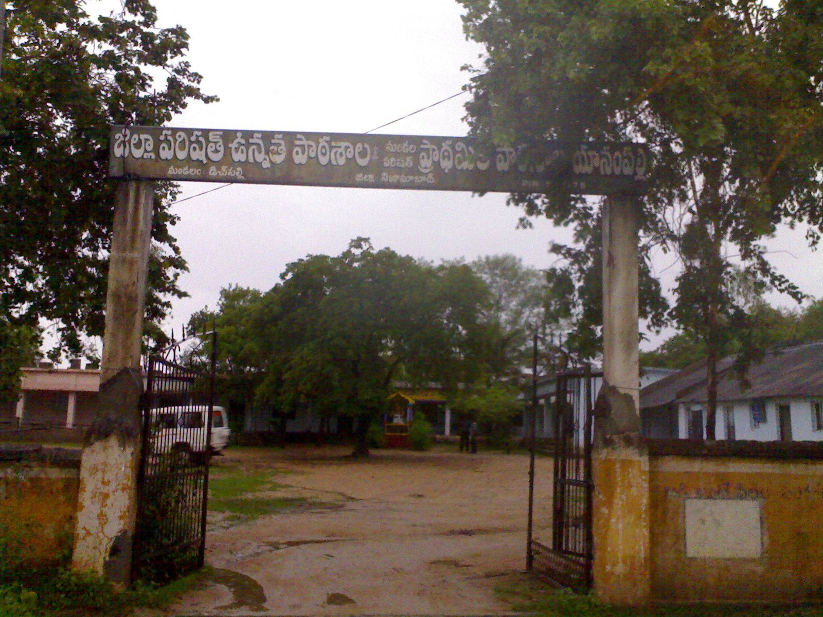 జిల్లా పరిషత్ ఉన్నత పాఠశాల యానంపల్లి